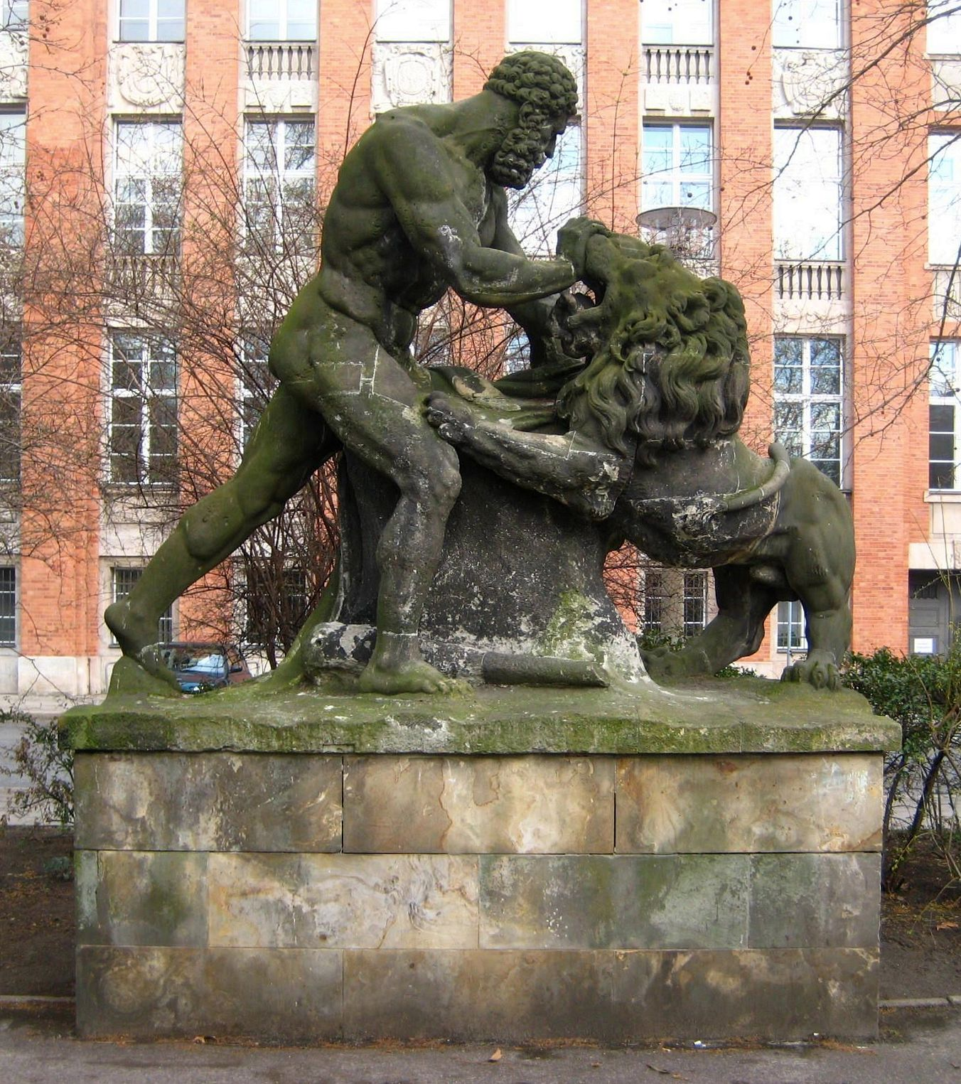 Die Sandsteinskulptur "Herkules im Kampf mit dem Nemeischen Löwen", geschaffen 1791 von Conrad Nicolaus Boy nach einem Entwurf von Johann Gottfried Schadow. Zusammen mit Schadows Werk "Herkules und der Zentaur Nessus" stand die Kolossalgruppe ursprünglich auf der Herkulesbrücke über den Festungsgraben an der Burgstraße. Nach Abriss der Brücke wurden beide 1890 auf die Moritzhofbrücke am Lützowplatz (gleichzeitig umbenannt in Herkulesbrücke) versetzt. 1934 lagerte man beide Skulpturen ein. Die Löwengruppe gehört seit 1971 zum Lapidarium im Köllnischen Park, die andere Skulptur ist seit dem Zweiten Weltkrieg verschollen. Die abgebildete Skulptur ist denkmalgeschützt.